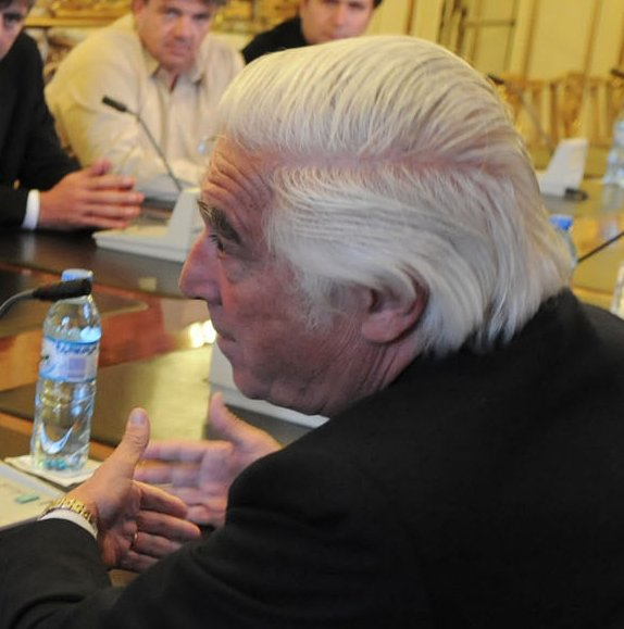 Luciano Miguens. Sociedad Rural Argentina. En entrevista con el gobierno durante el paro patronal agropecuario de 2008. Argentina